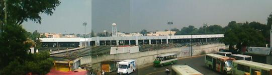 Composicion de cuatro fotografias que muestra los talleres de la estacion Tasqueña de la linea 2 del Metro de la Ciudad de Mexico.